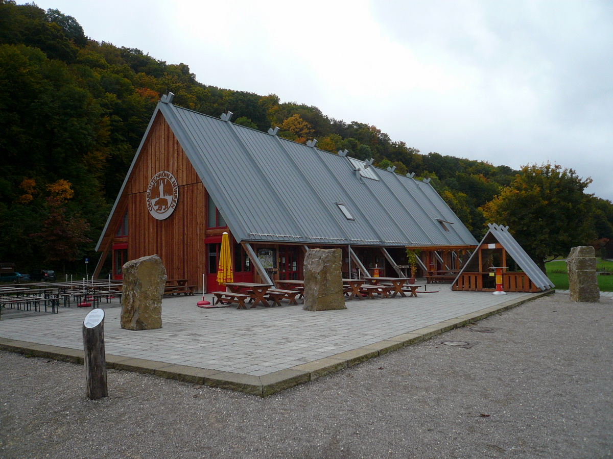 Charlottenhöhle